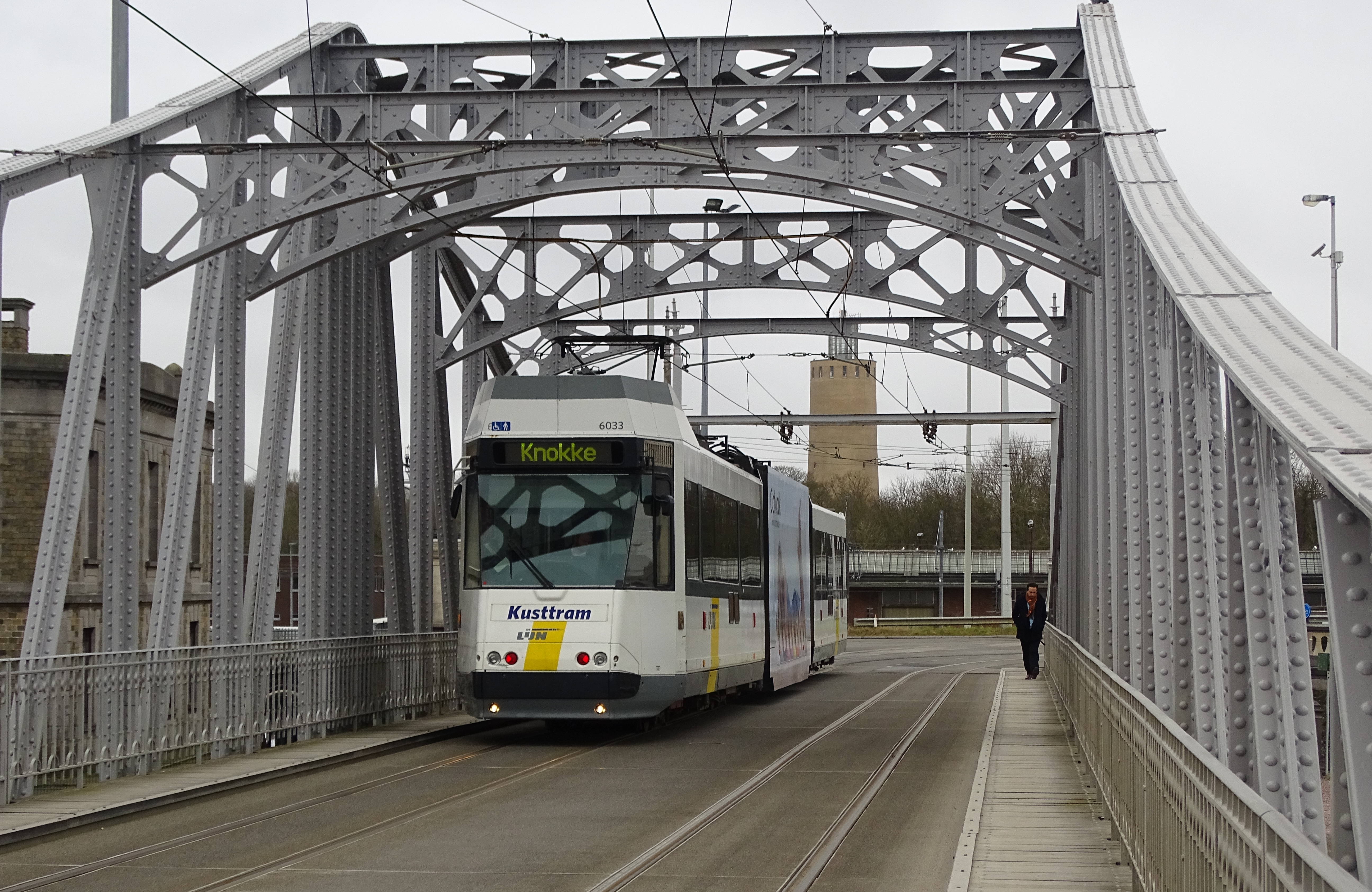 Reportage réalisé le vendredi 18 mars à l'occasion du départ de la Handzame Classic 2016 à Bredene, Belgique.